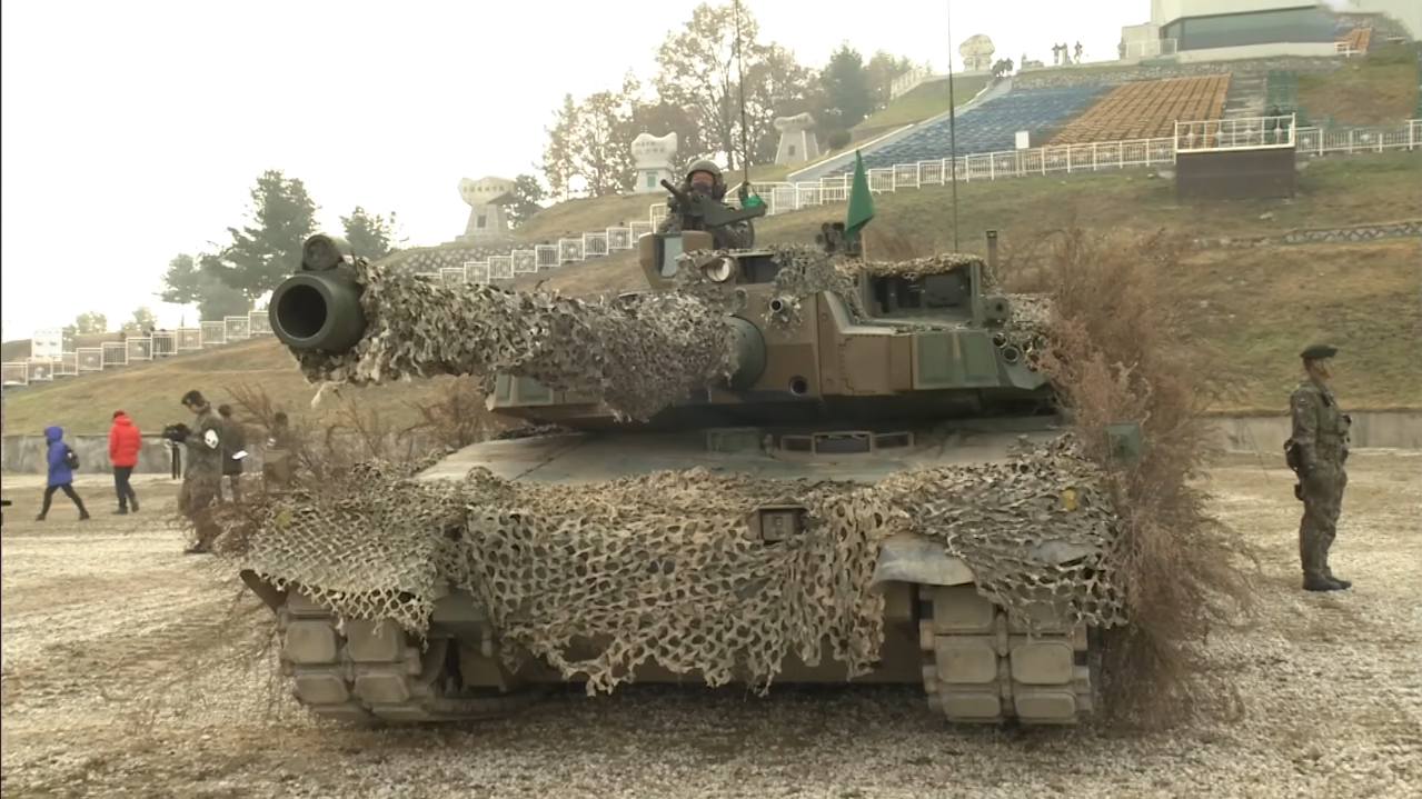 대한민국 주력전차 K2흑표전차 훈련